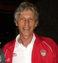 José Néstor Pekerman (Deportivo Toluca)